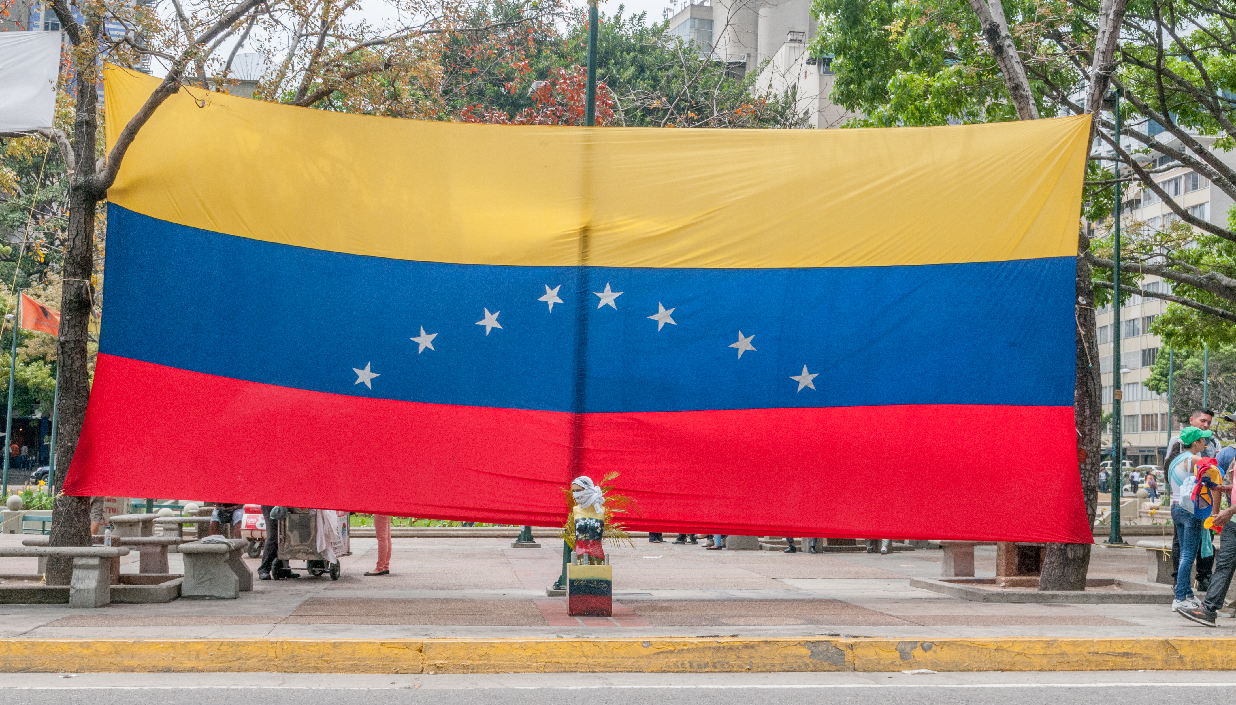 Bandera en Manifestación Pacífica en contra del Gobierno de Nicolas Maduro en Plaza Altamira